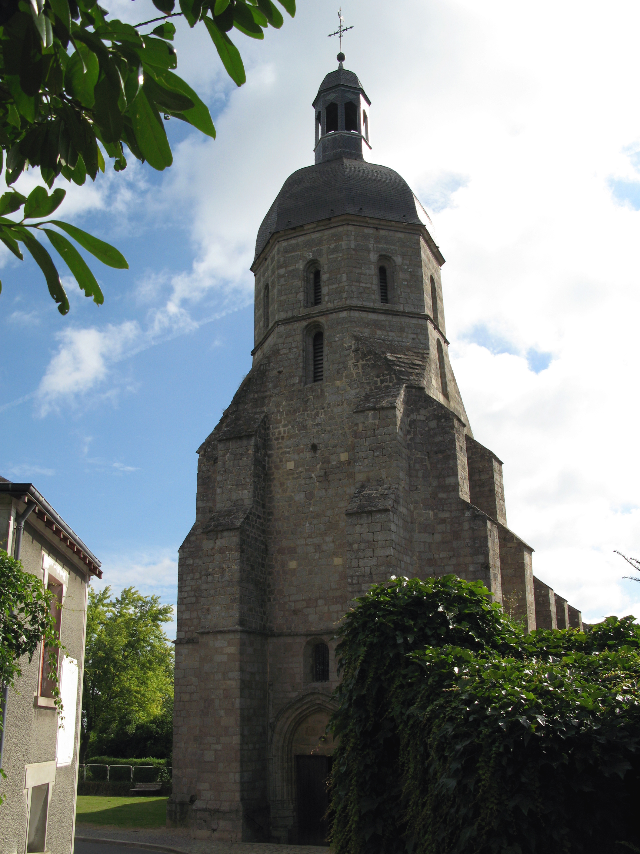 Aigurande (Indre, France) - L'église. . .